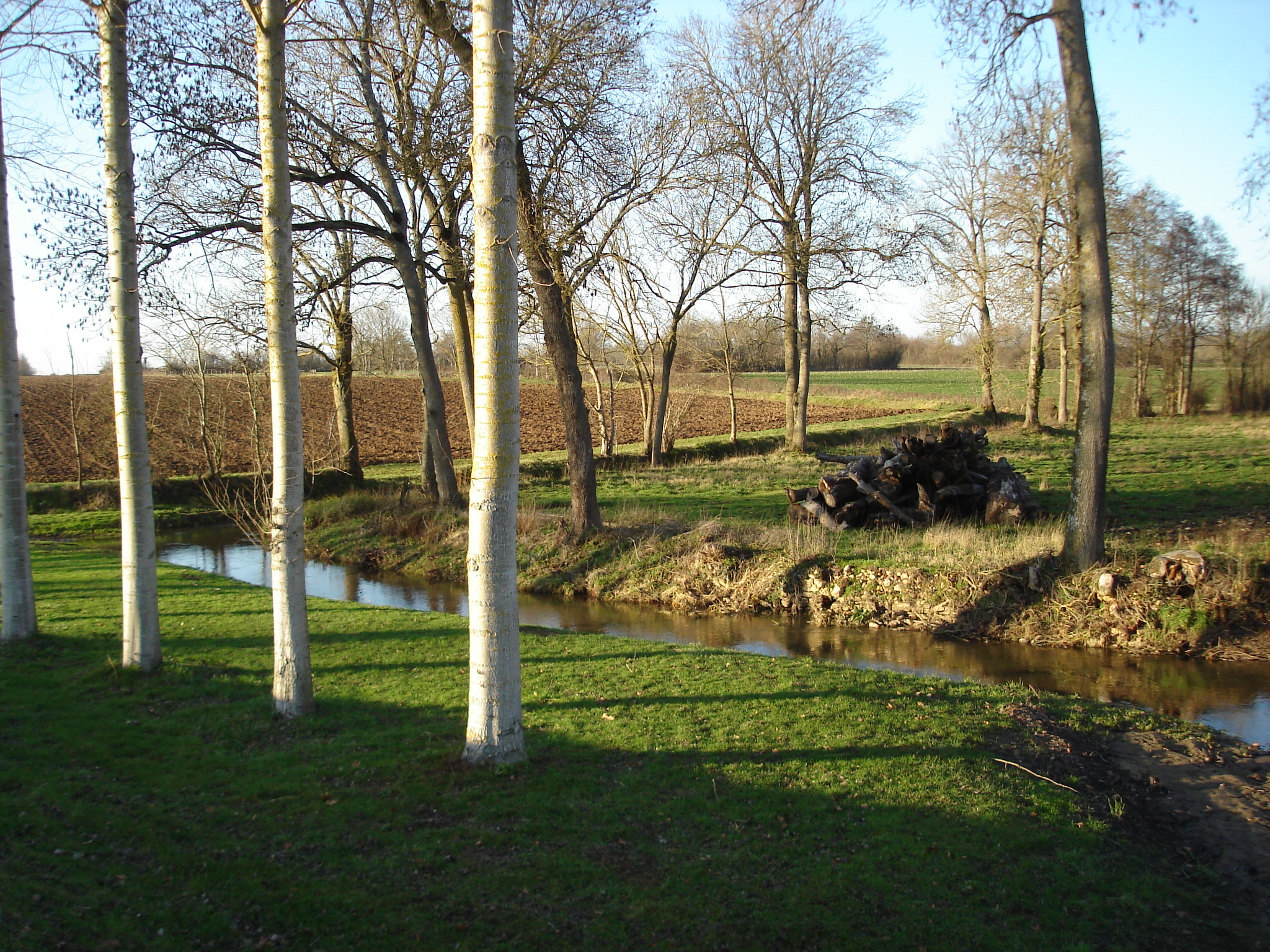 La rivière Igneraie, en direction de Thevet-Saint-Julien, à Lacs (36).